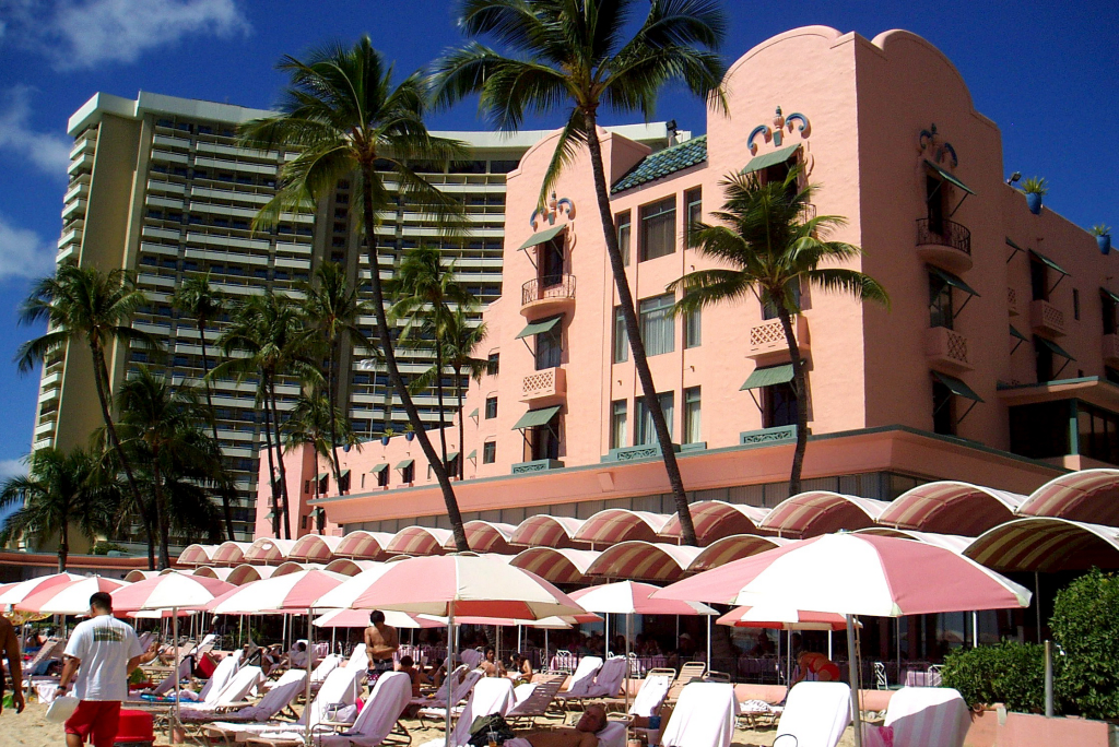 Royal Hawaiian Hotel, in Hawaii